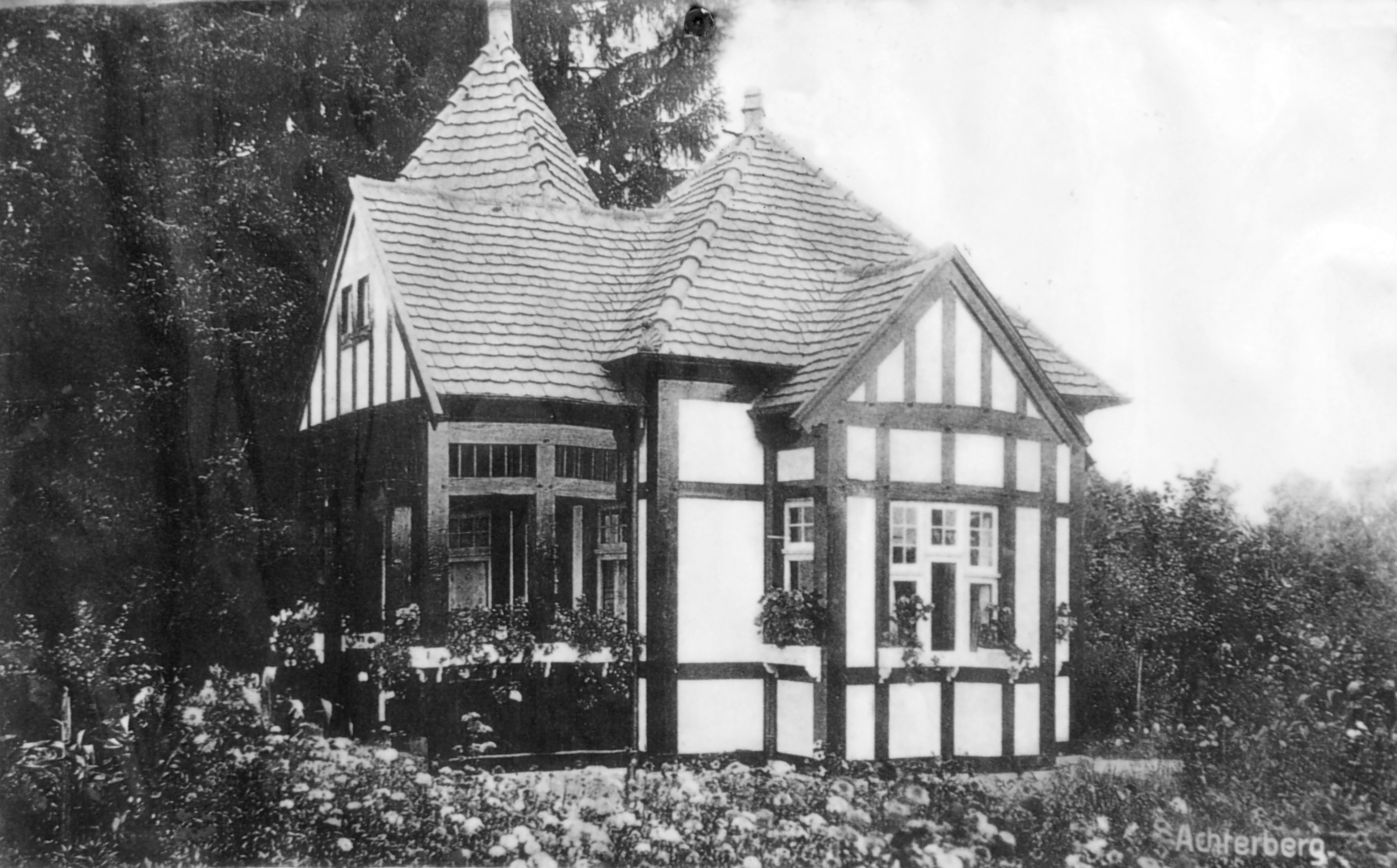 Ehemaliges Teehaus auf Achterberg